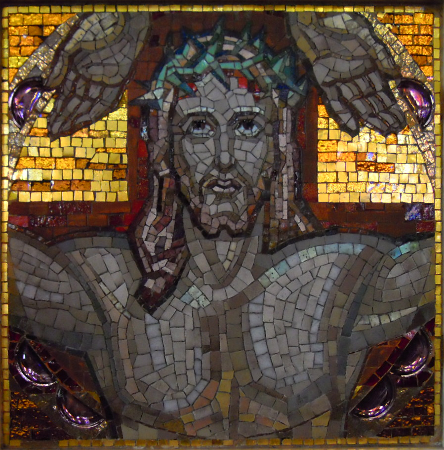 Christ